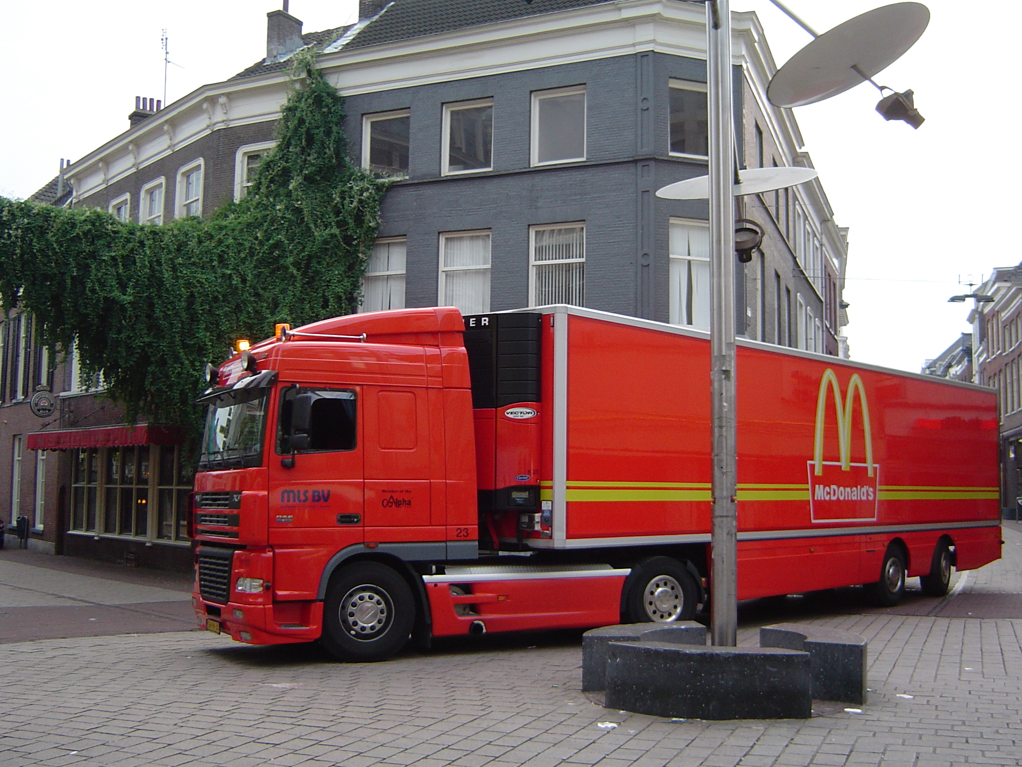 Koeltrailer